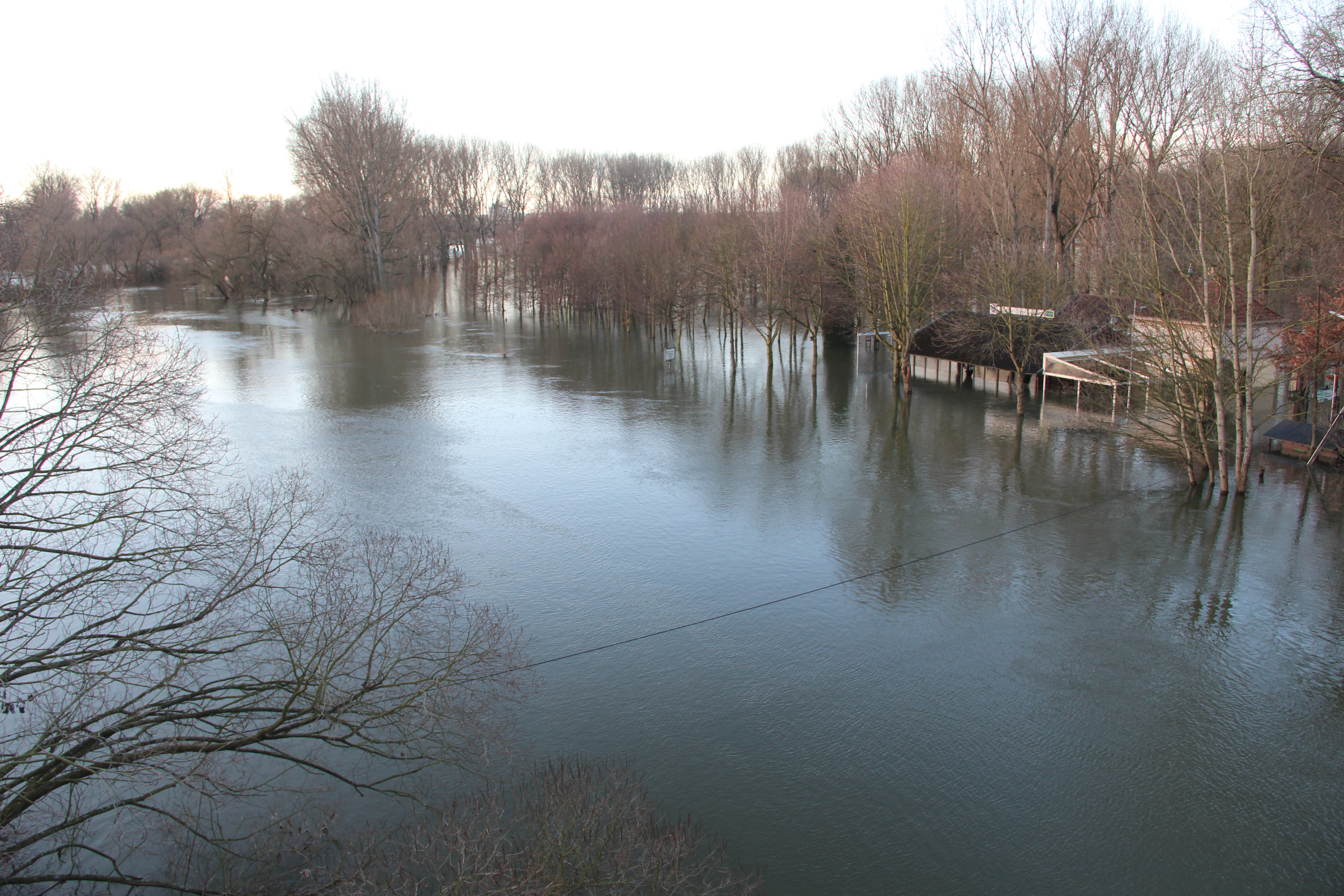 Siegfähre bei Hochwasser